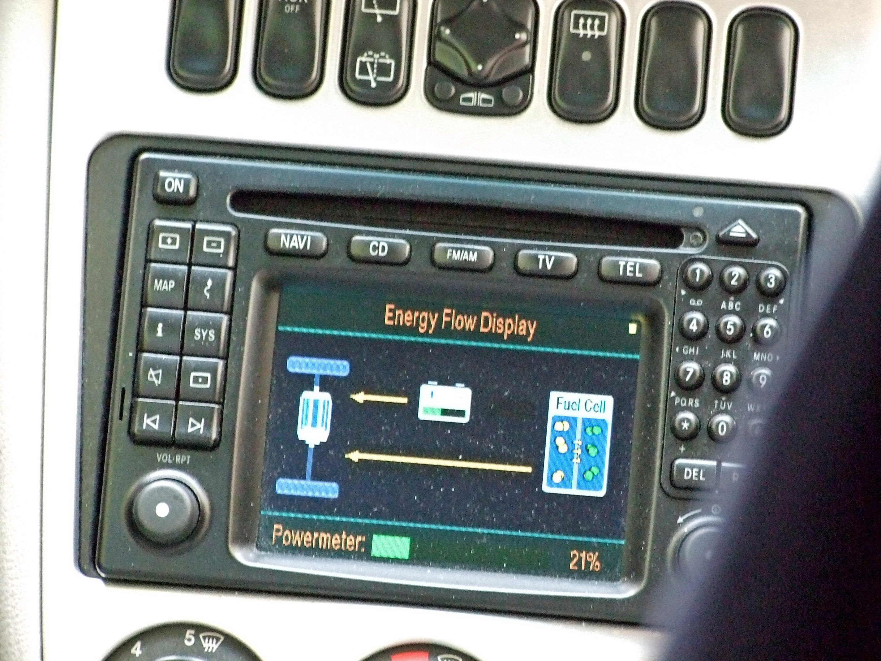 Display eines Mercedes-Benz F-Cell Fahrzeuges (mit Brennstoffzellen) während der Fahrt